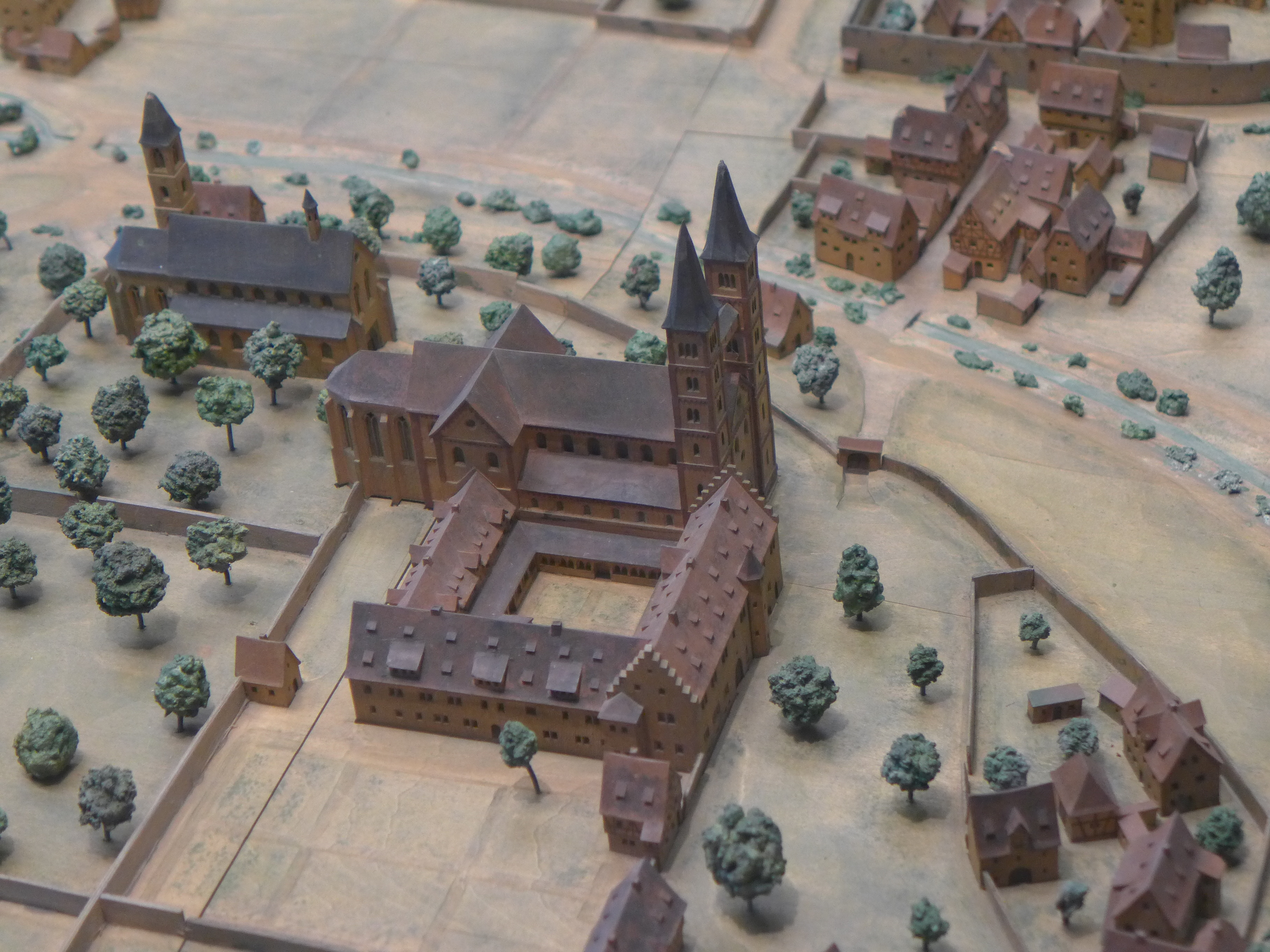 Modell des Stiftes Haug um das Jahr 1525, aktuell ist hier der Würzburger Bahnhofsvorplatz (Konzeption Franz Serberich, Ausführung Georg Achatz u. Karl Steinbauer, 1953-1967, Lindenholz, Maßstab 1:500, Fürstenbaumuseum Würzburg)